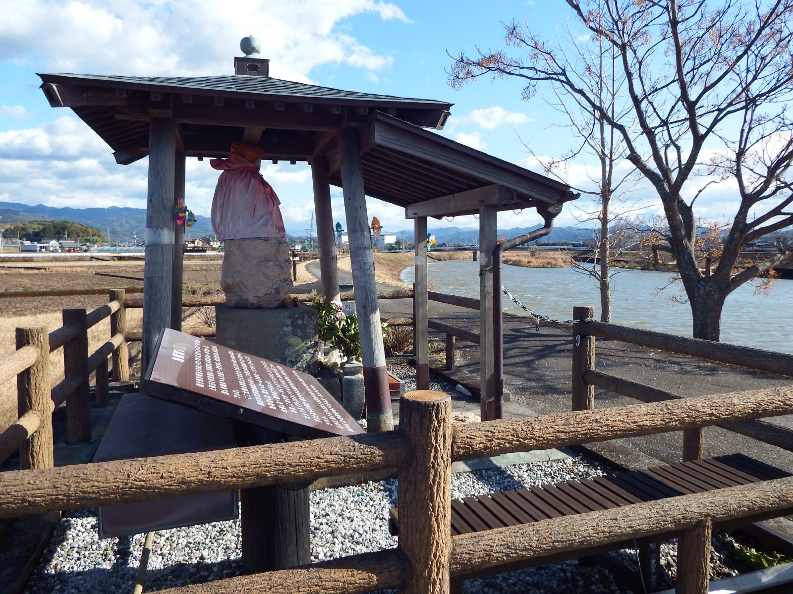 土佐国分寺 地蔵渡し